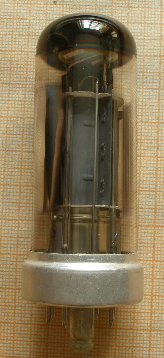 Double diode - pentode (TUNGSRAM)